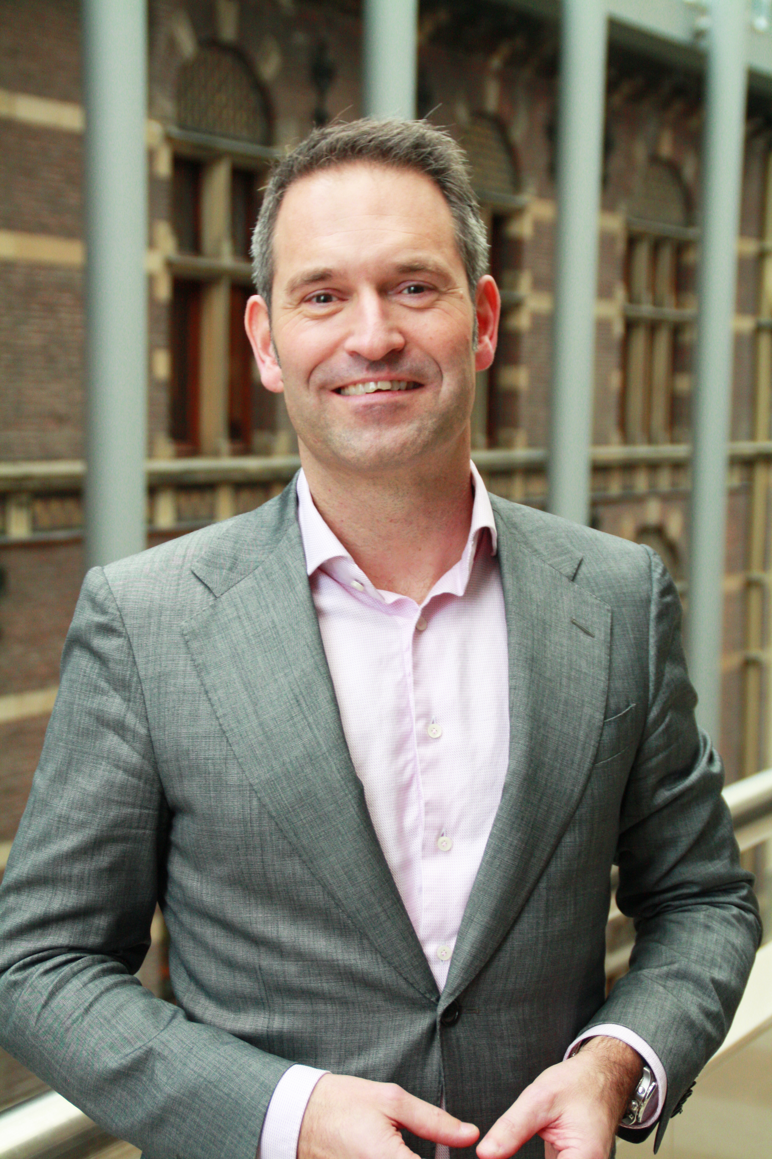 Michel Rog